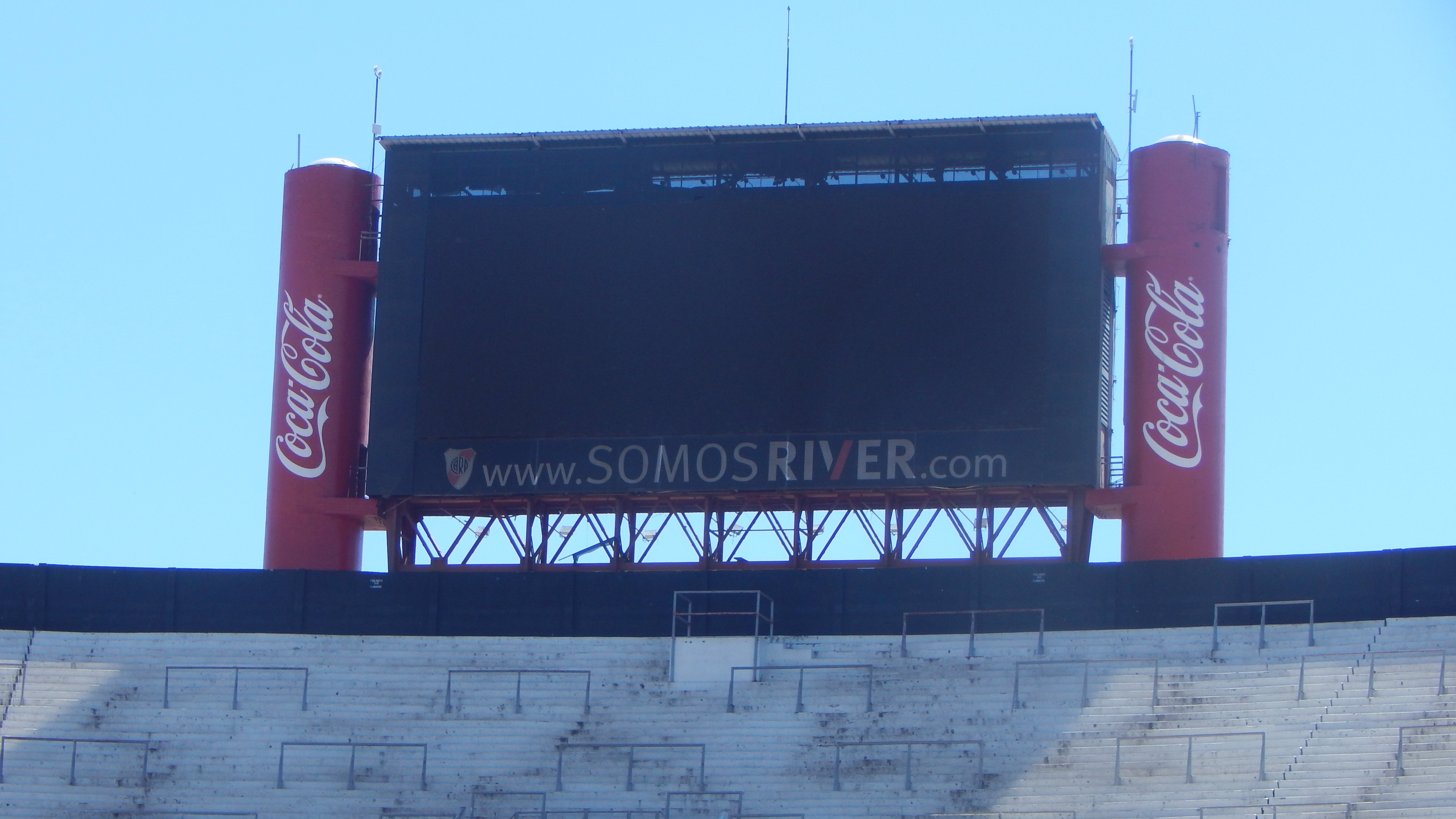 Pantalla LED del Estadio Antonio Vespucio Liberti "El Monumental" del Club Atlético River Plate, en septiembre de 2016.